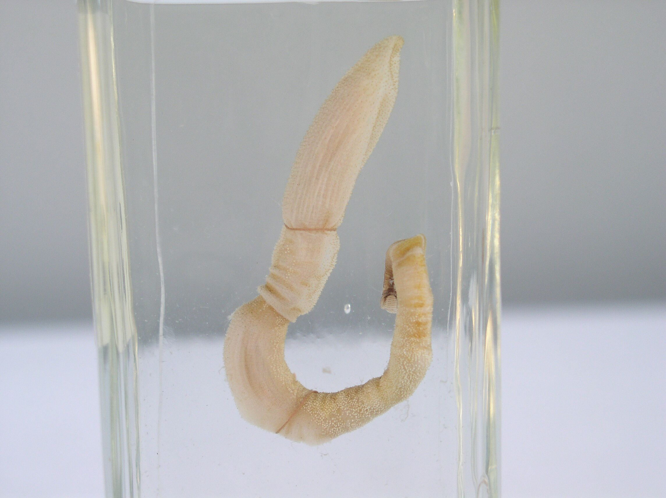 Eichelwurm, Exemplar aus der Sammlung des Institutes für Zoologie, FU Berlin. GNU FDL